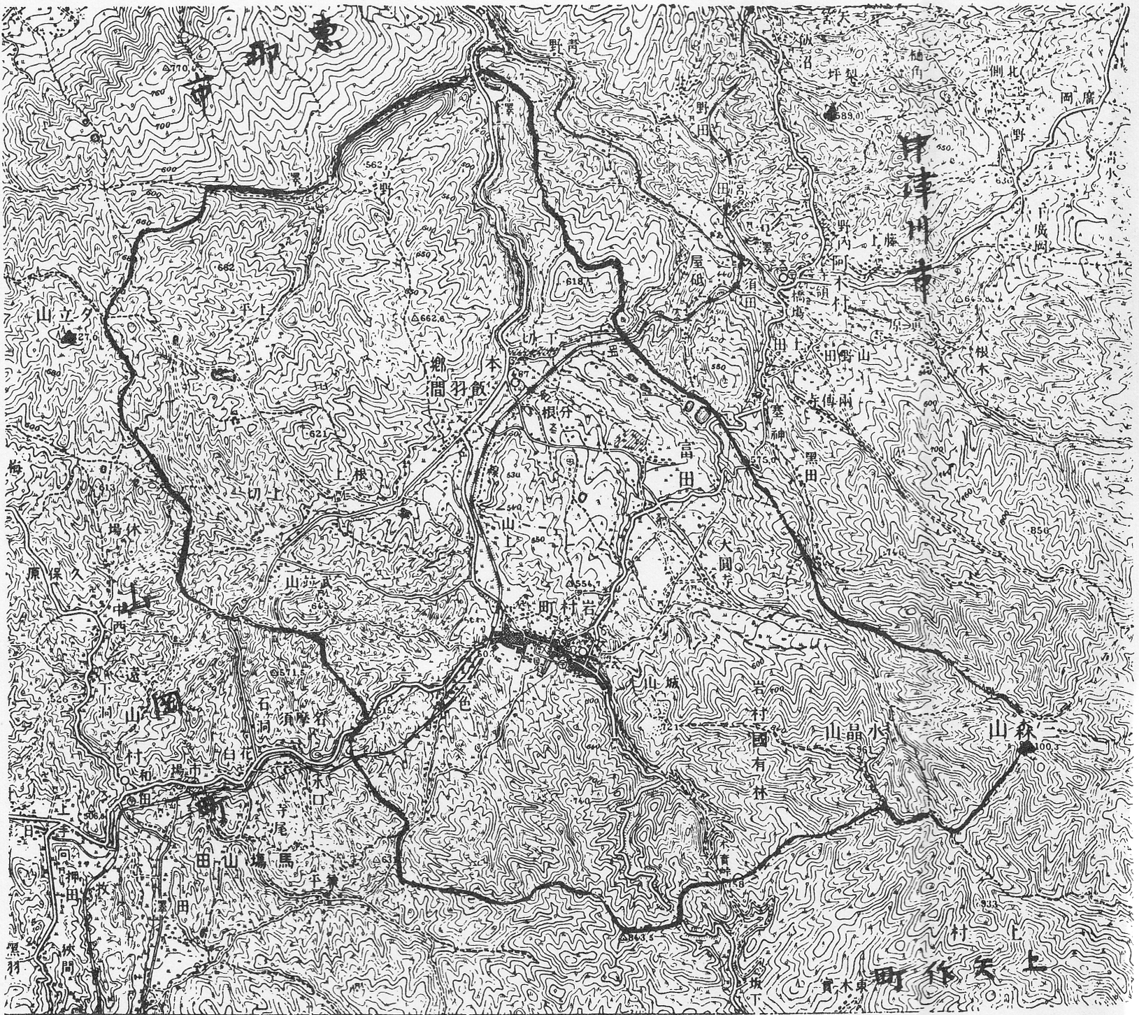 岩村周辺地図